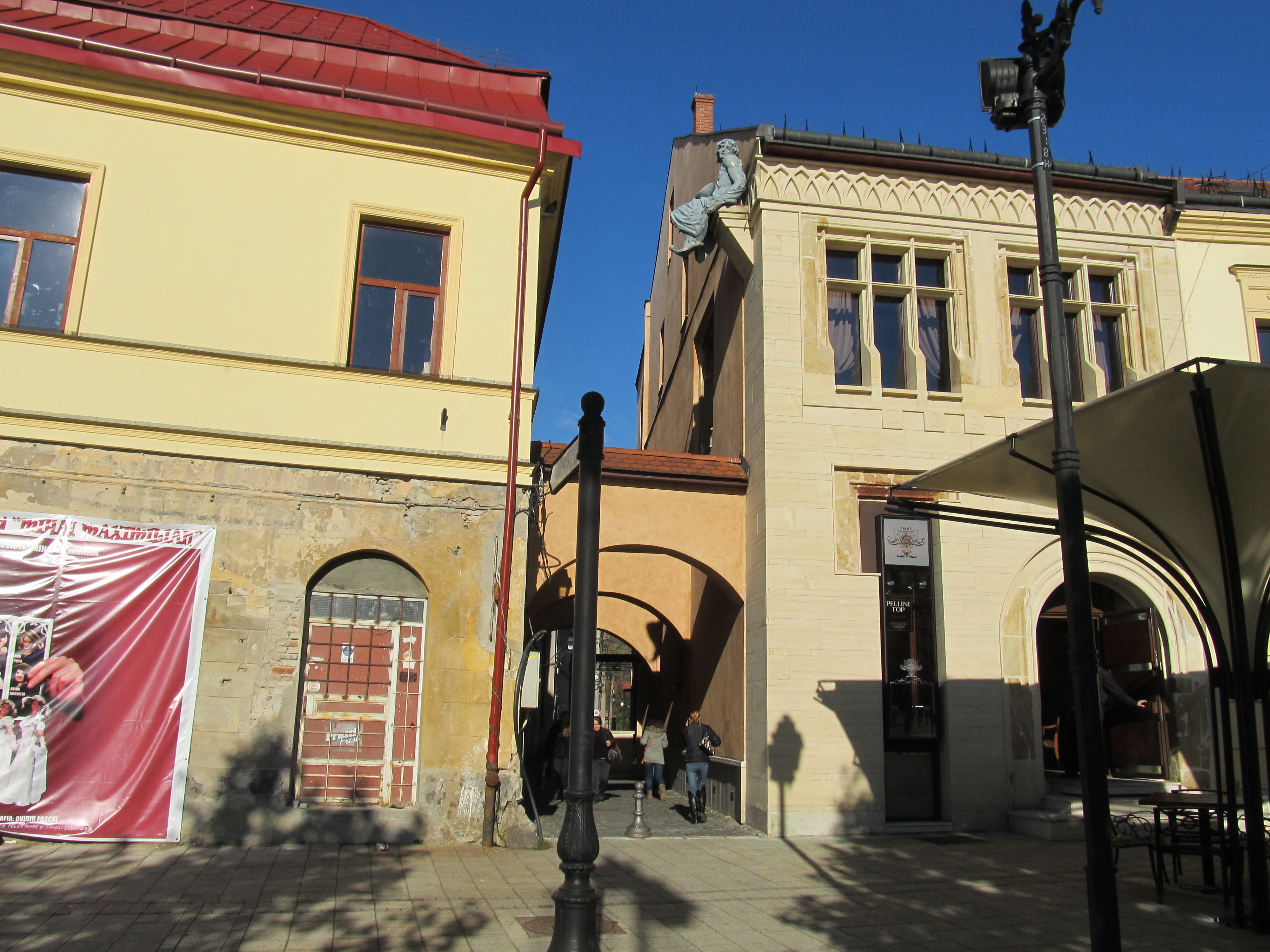 Casa Harácsek din Baia Mare (stânga).